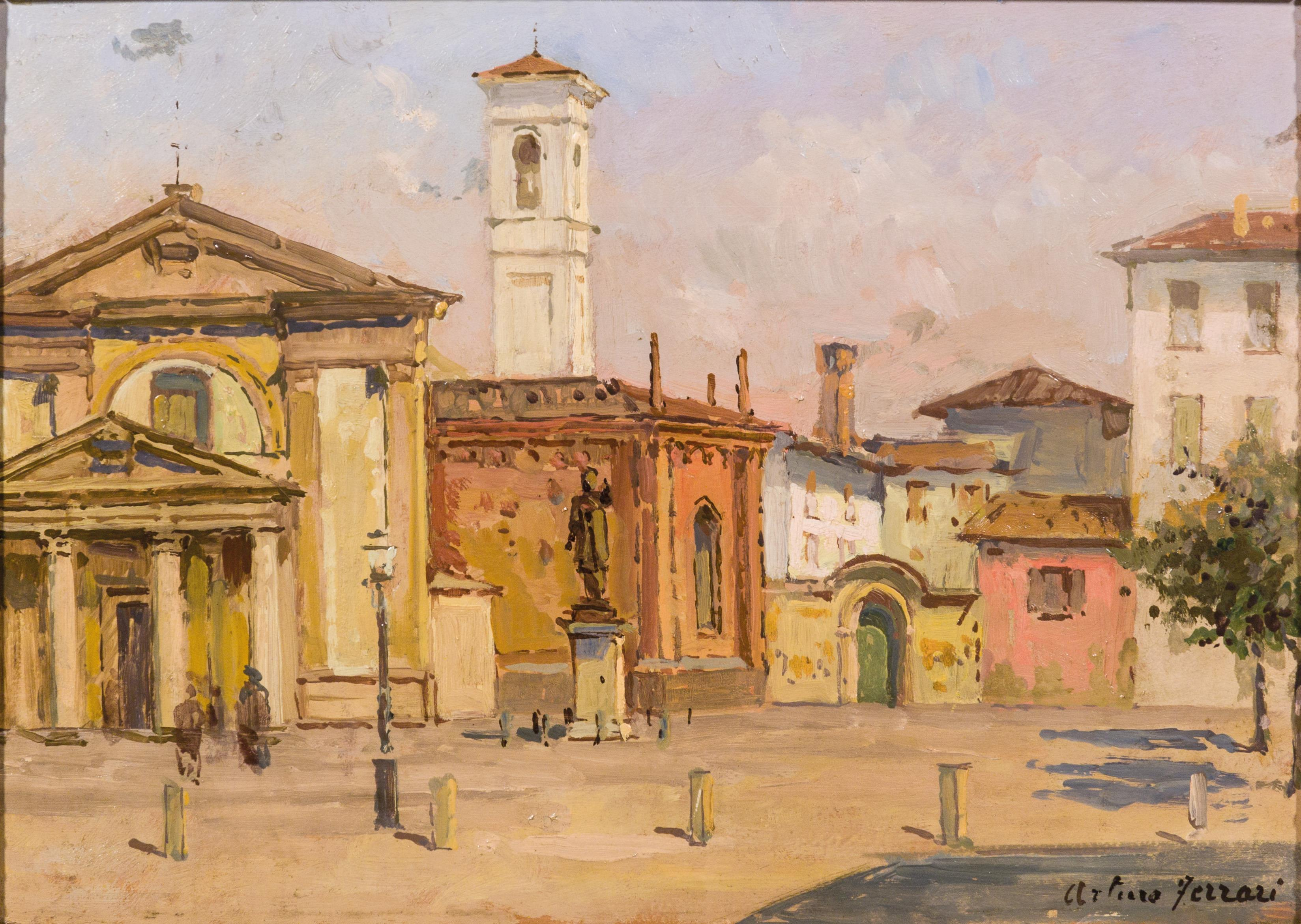 Piazza Borromeo, Mailand, signiert Arturo Ferrari, rückseitig signiert, datiert und bezeichnet Arturo Ferrari Piazza Borromeo Milano 1919, Öl auf Holz, 25,5 x 35,5 cm